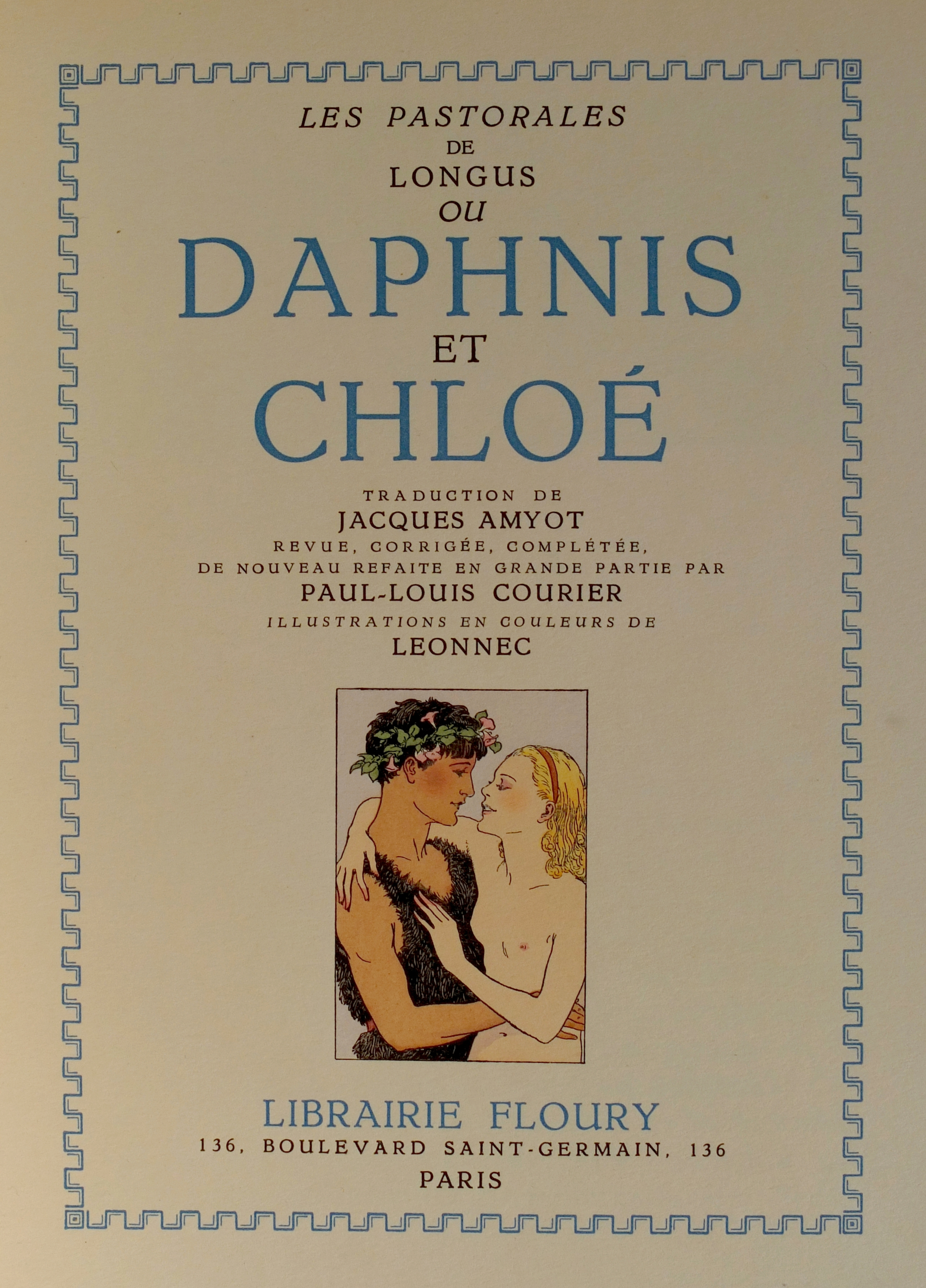 Daphnis et Chloé, texte de Longus. Page de titre de l'édition de la librairie Floury, Paris 1934. Illustrateur Georges Léonnec. Dimention de la page originale : 21x26 cm.